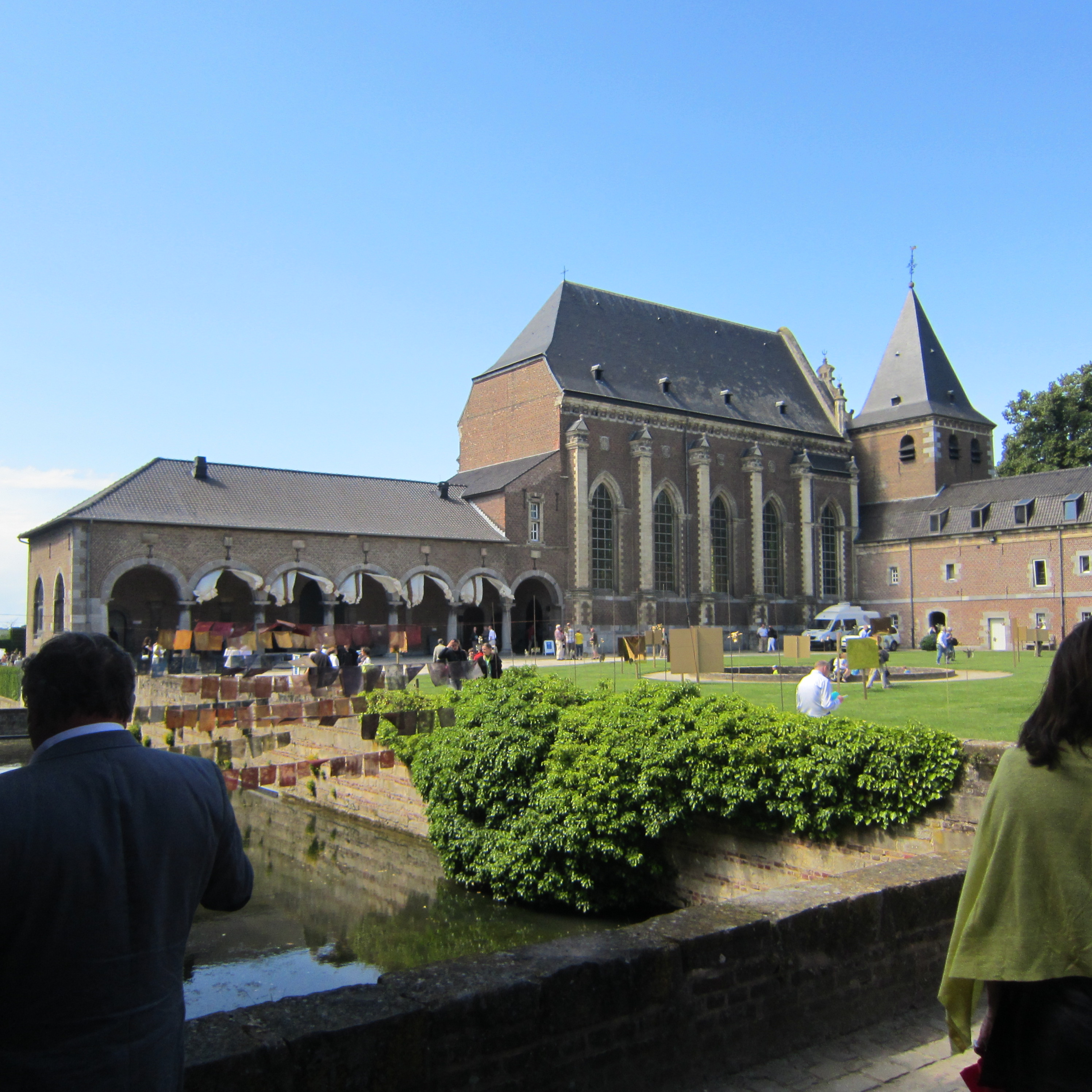 Zicht op buitenhof met kerk, Alden Biesen, Bilzen